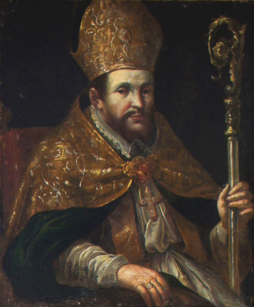 Porträtgemälde von Stephan von Seiboldsdorf, Fürstbischof von Freising, im Fürstengang zwischen Fürstbischöflicher Residenz und Freisinger Dom.